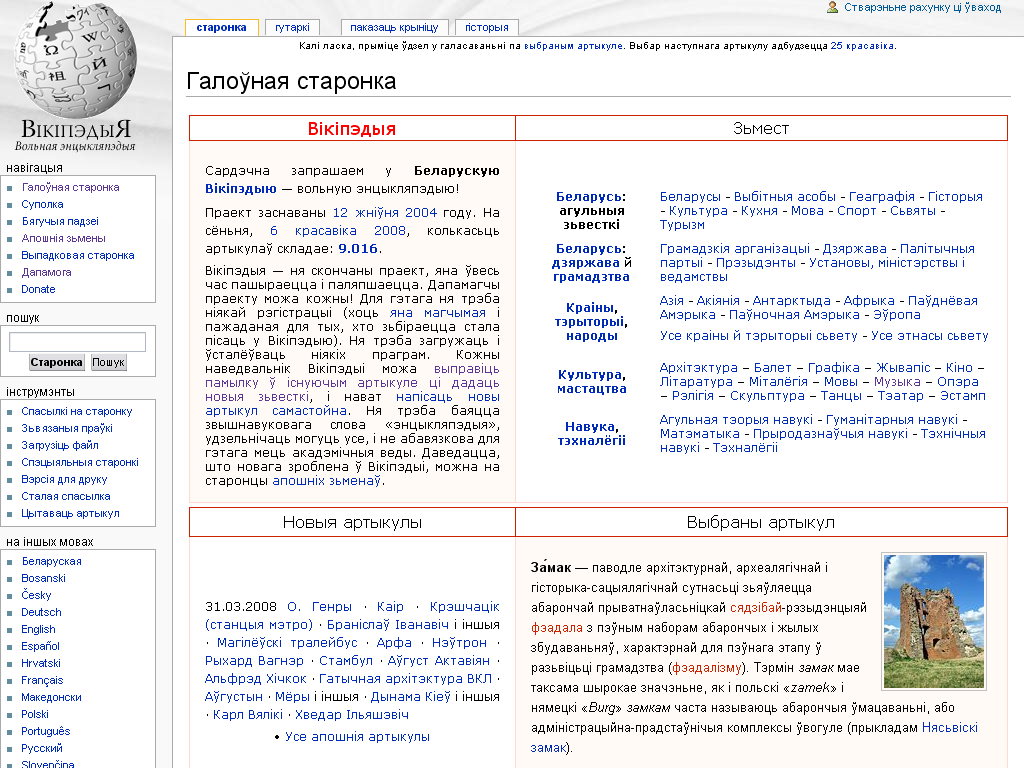 Беларуская (тарашкевіца): Беларуская вікіпэдыя. Прыклад вэб-старонкі